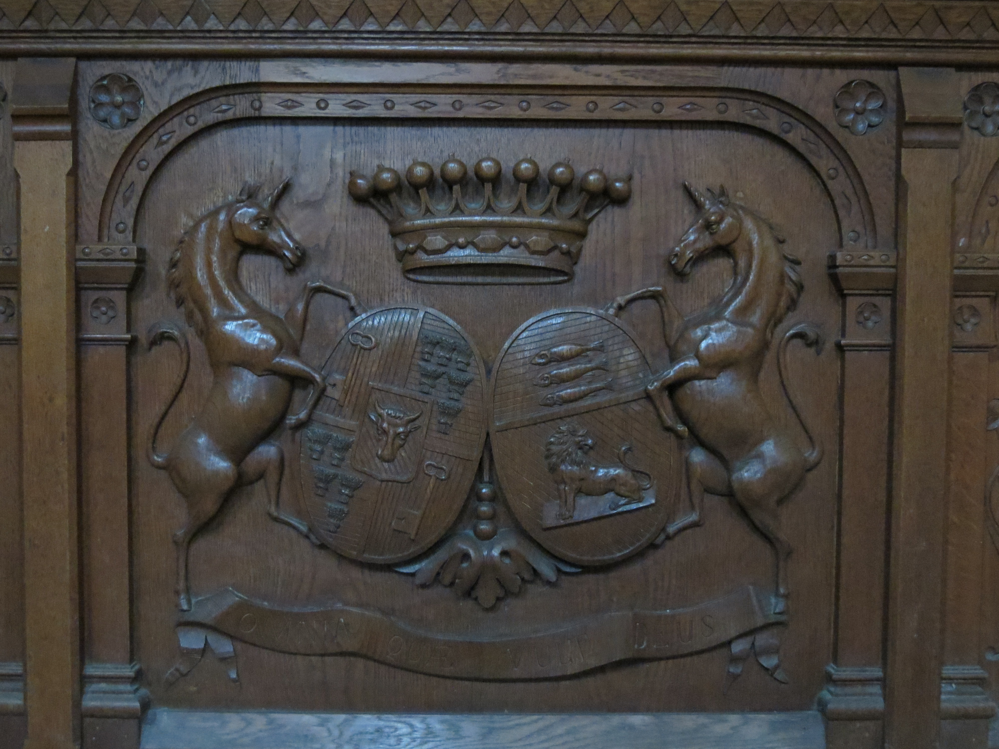 Église Saint-Sulpice de Breteuil.